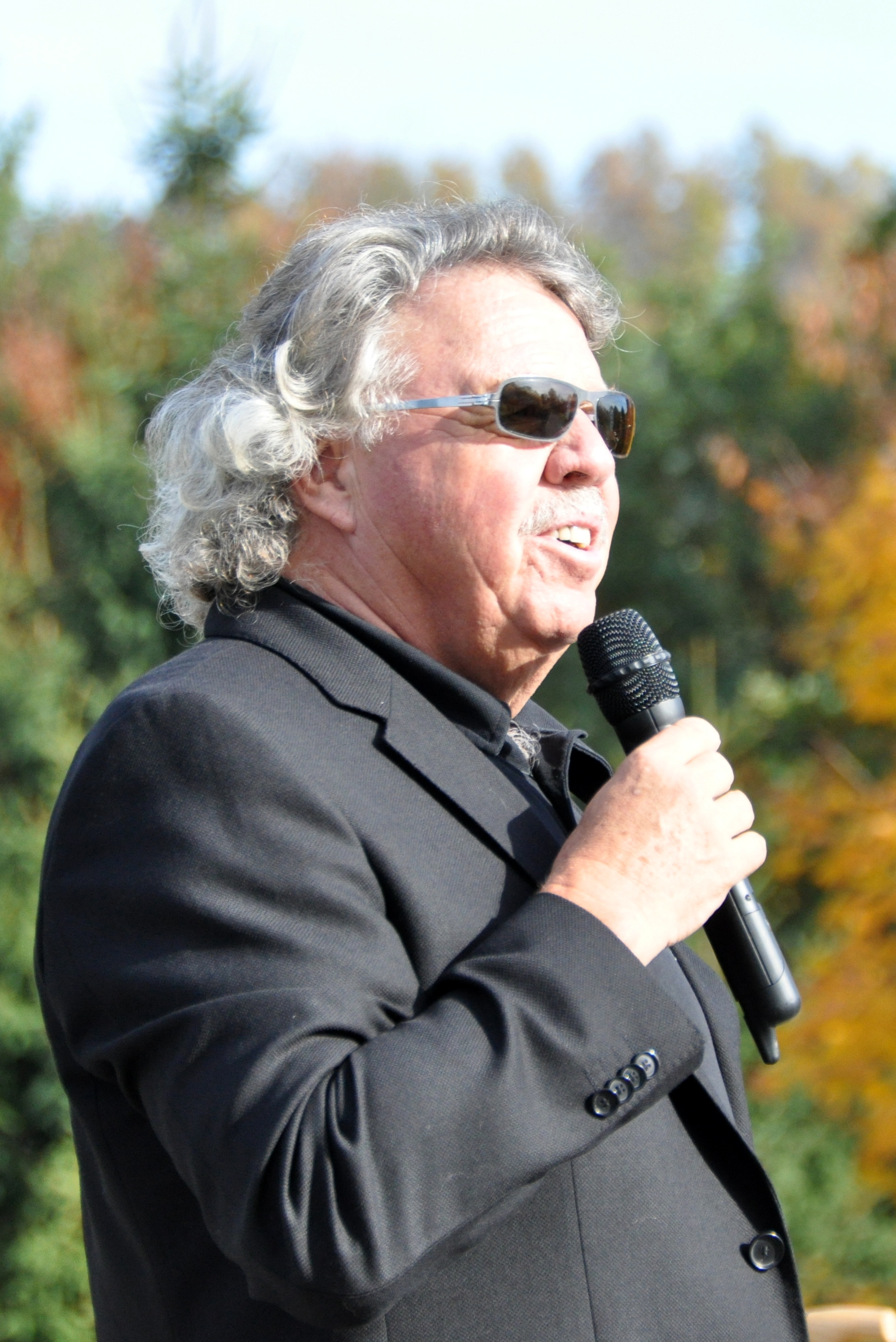 Wolfgang Steinlechner bei der Spatenstichfeier zum neuen Musikheim in St. Gotthard im Mühlkreis am 20.10.2013